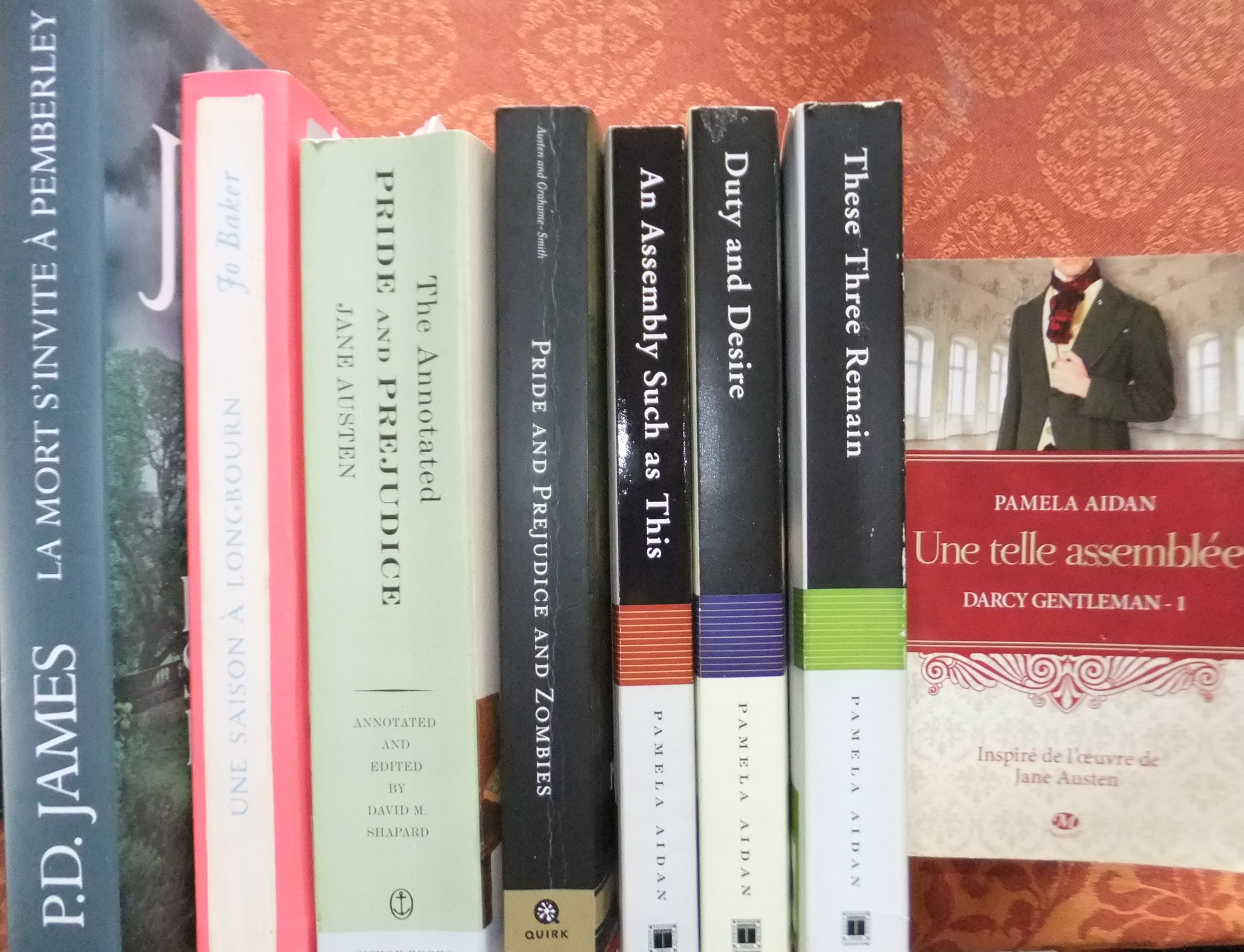 Empilement de livres : "Pride and Prejudice" et diverses fictions inspirées par le roman de Jane Austen : des suites ou des variations.